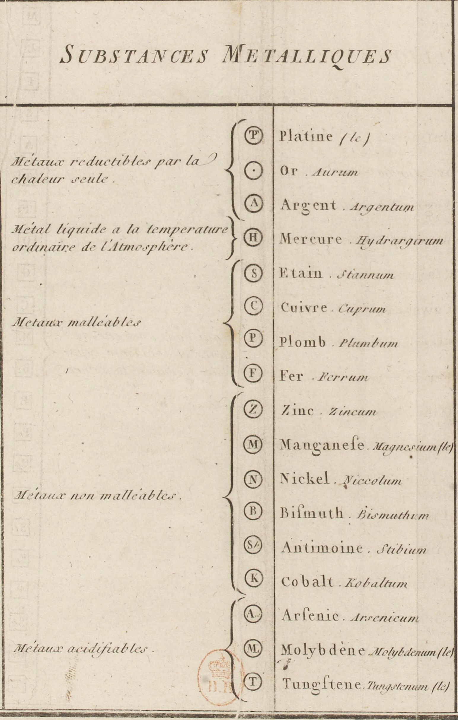 Fragment de la Taula 1 on hi ha la relació de substàncies simples amb els seus símbols del llibre Méthode de Nomenclatura Chimique